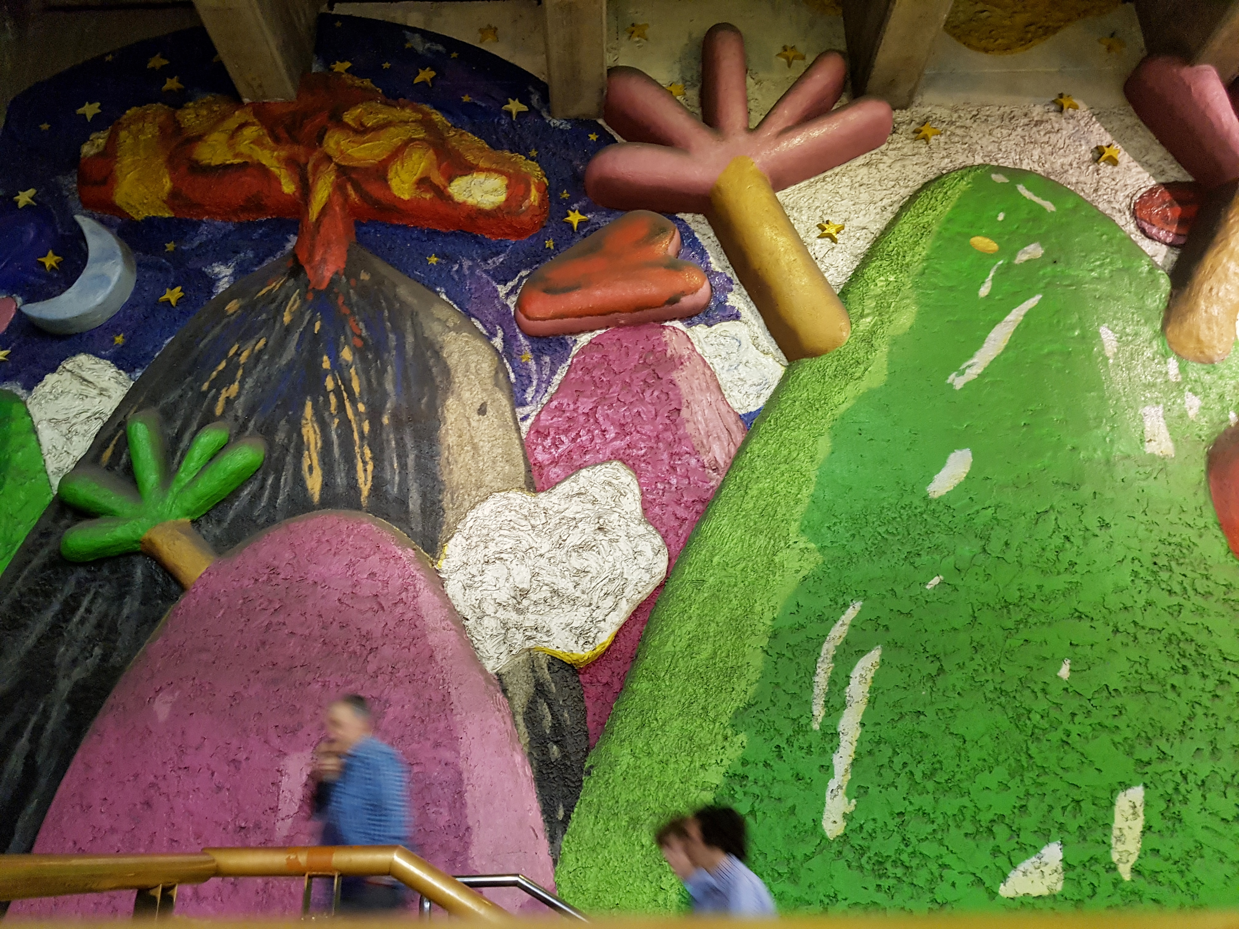 Vía Láctea (técnica mixta, 1998), mural del pintor chileno Francisco Smythe en la estación de metro Baquedano, Santiago de Chile.